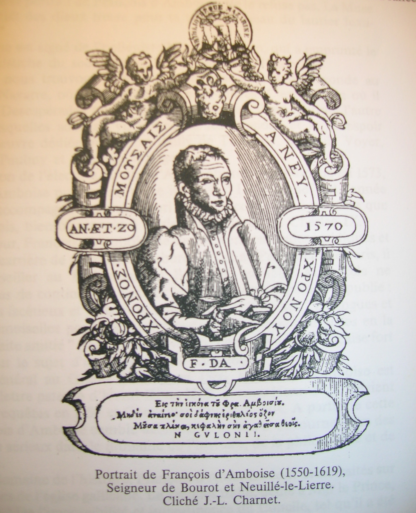 En 1570, à l'occasion du mariage d'Henri de Lorraine duc de Guise, avec Catherine de Clèves, François d'Amboise puplia un panégyrique dédié au cardinal de Lorraine. Ce panégyrique est précédé d'un portrait de François d'Amboise (reproduit ci-joint). Il est représenté dans un médaillon entouré de muses et de lauriers, et encadré de sa devise en grec: "Chronos Moussaïs aneu chronou", ce qui veut dire en latin " Musis sine tempore tempus", et en francais, " Pour les muses le temps ne compte pas", allusion probable à la précocité de ses dons poétiques.